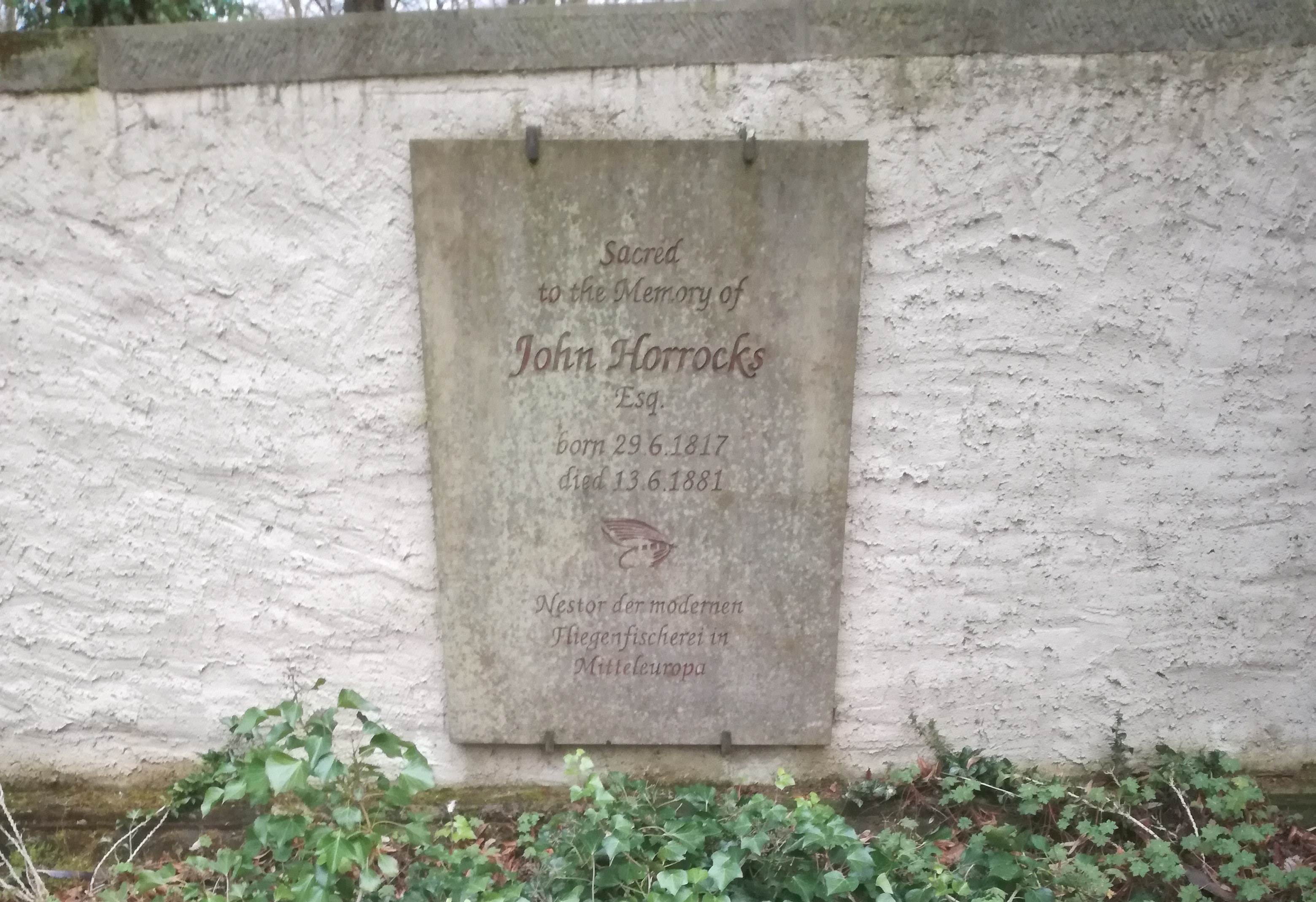 Gedenktafel